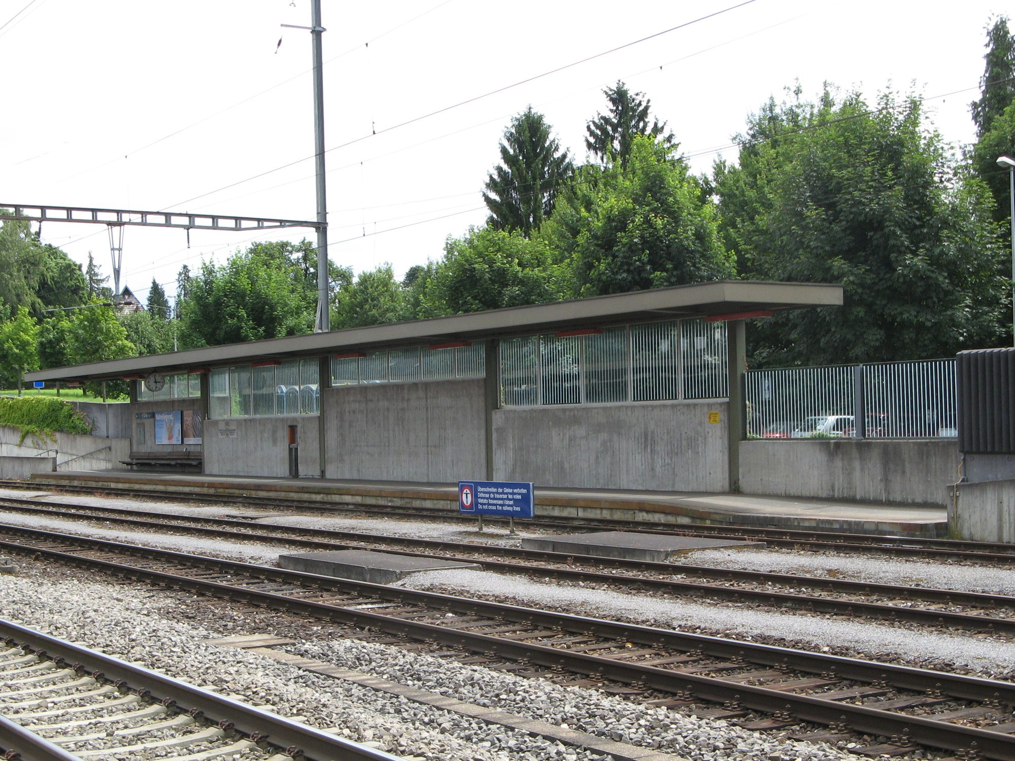 Bahnhof Wohlen, ungenutzter Perron der stillgelegten Wohlen-Meisterschwanden-Bahn